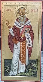 San Rufillo, Santo patrono di Forlimpopoli (FC), Italy.